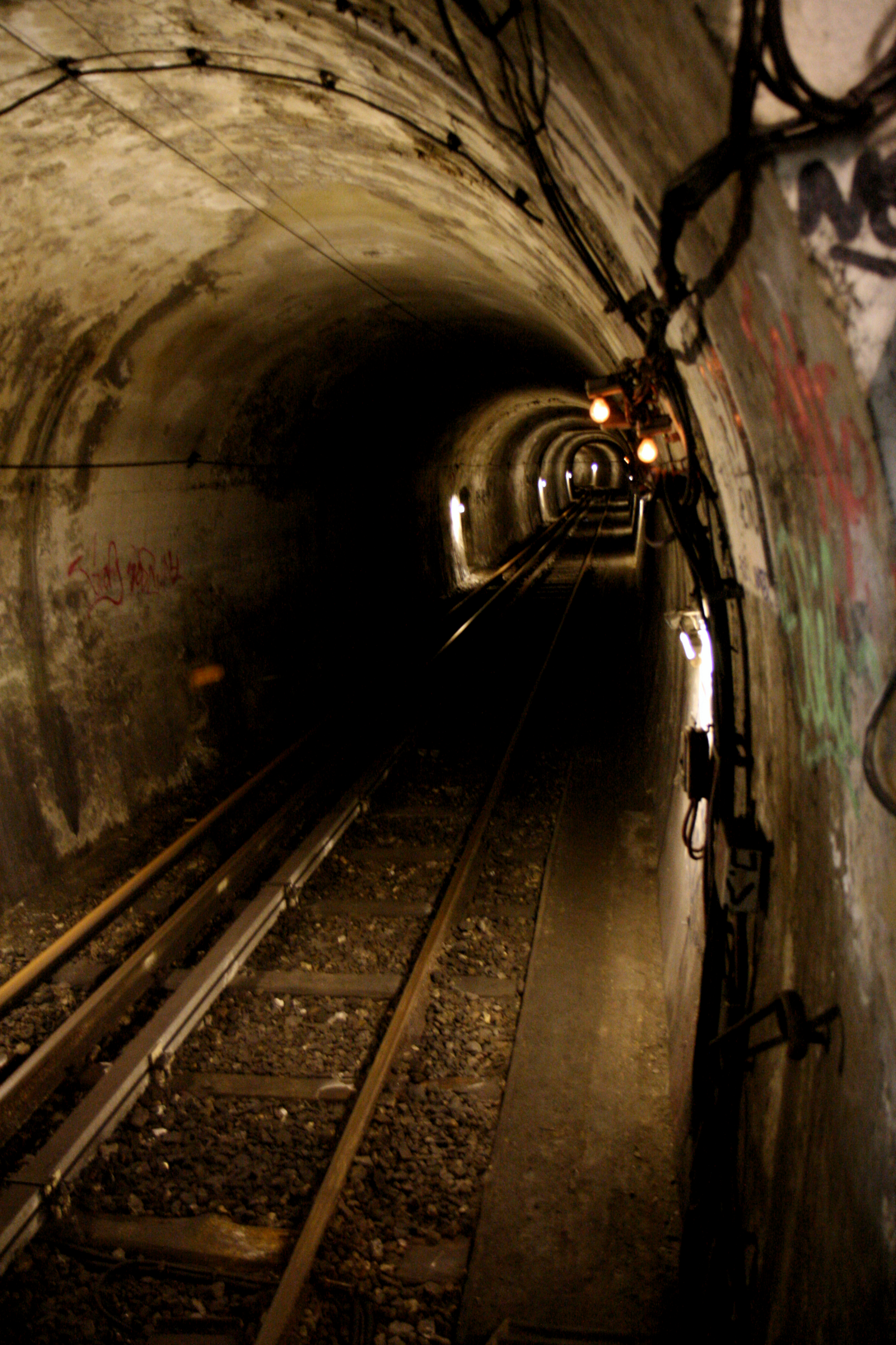 Voie des Fêtes depuis Haxo (vers le sud / Porte des Lilas)